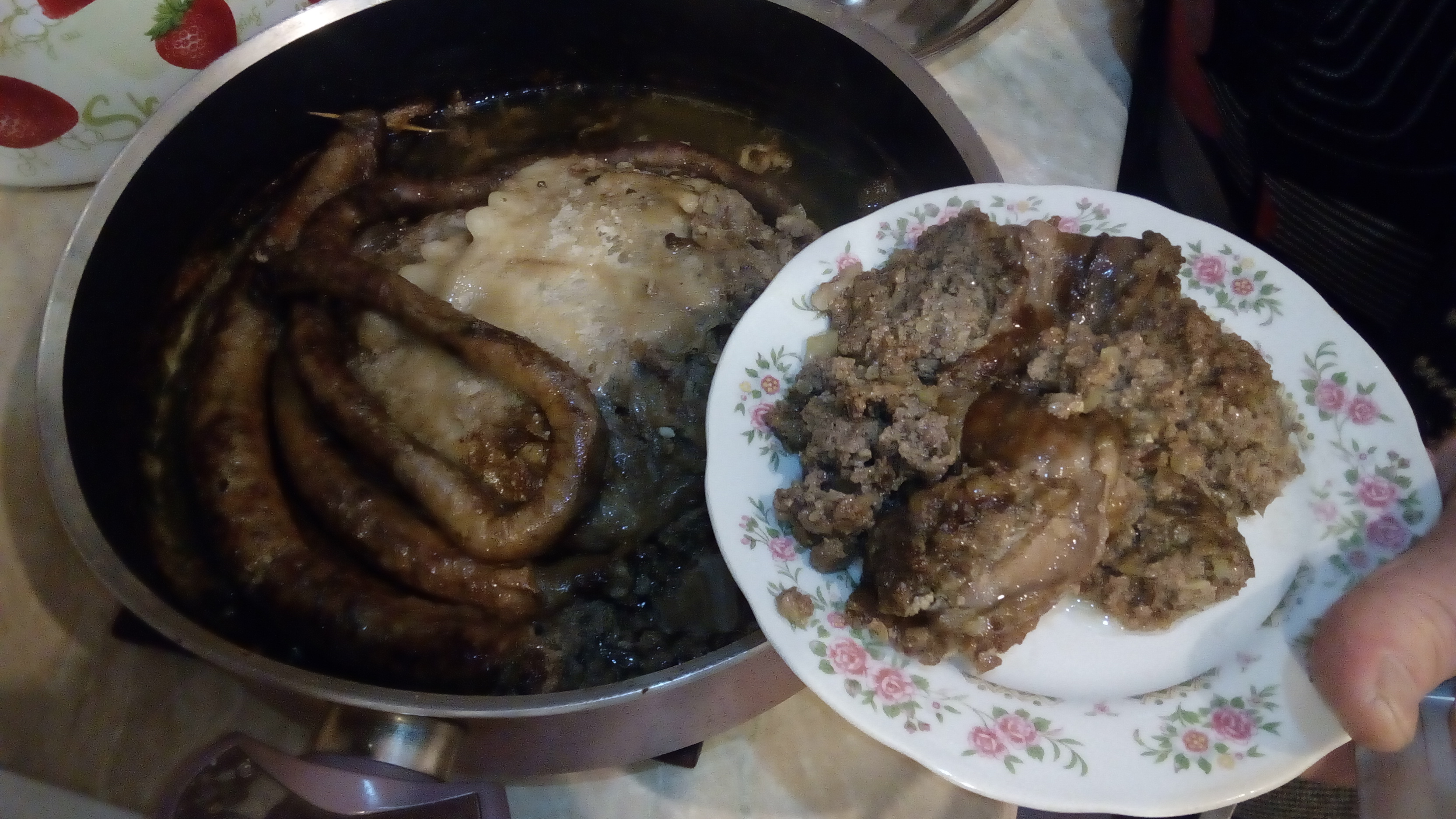 Bağırsaq dolması və qarın pərdəsindən hazırlanmış dolmanın bişirilməsi Daha ətrafı: bu videoda